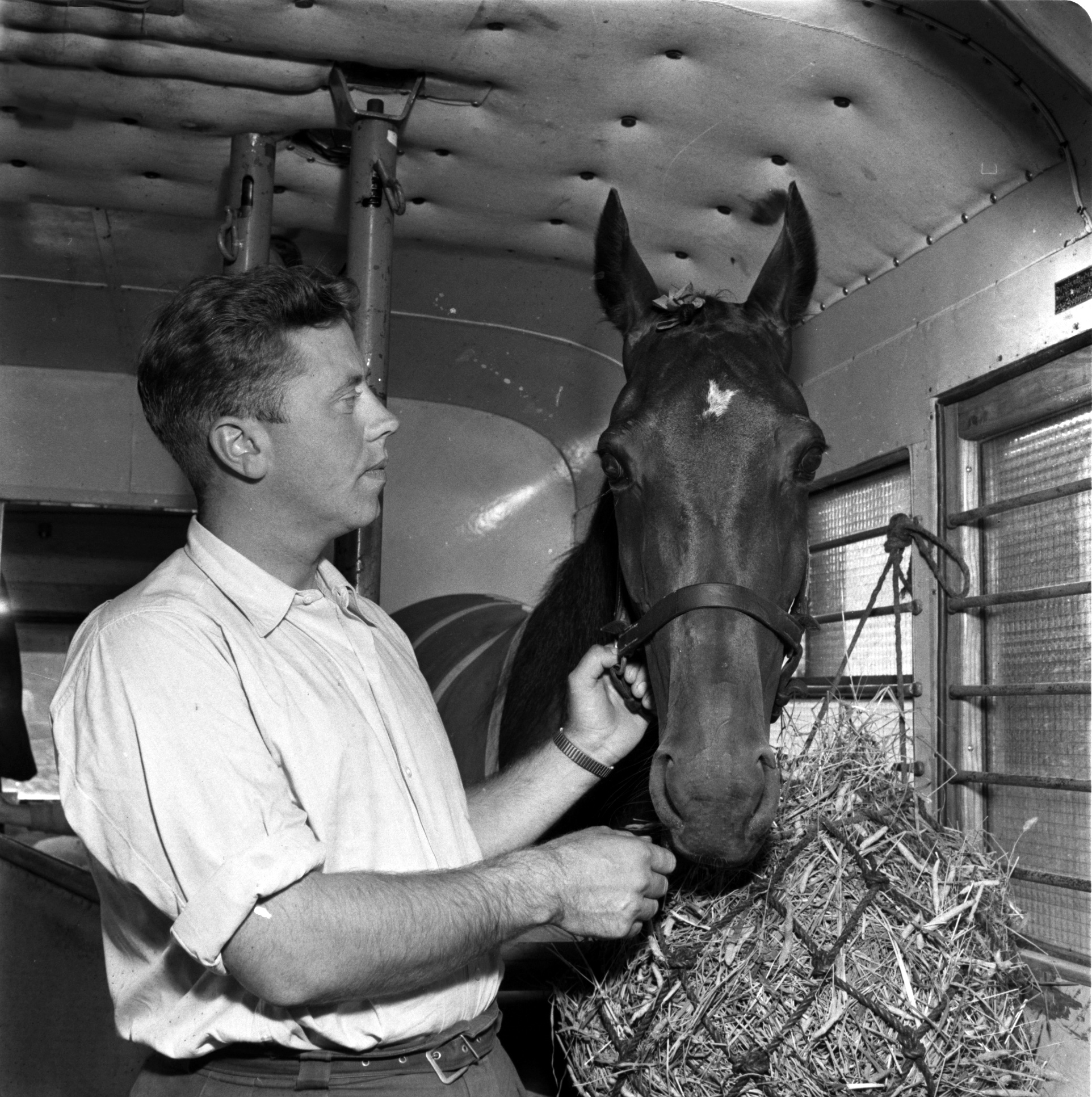 Olle Andersson och Frances Bulwark i stallet